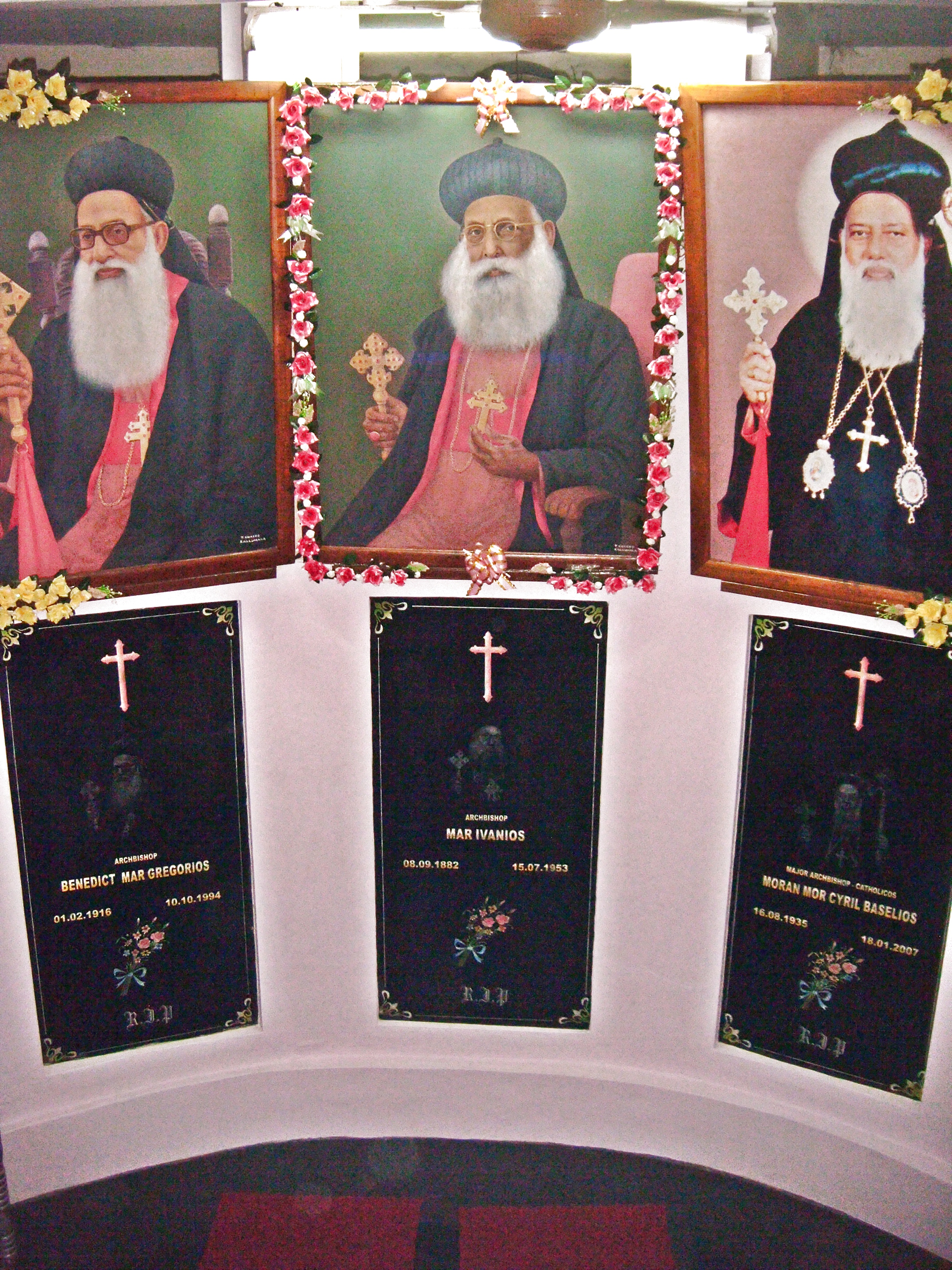 Trivandrum, Kerala, Indien, St. Mary`s Cathedral, Bischofsgruft